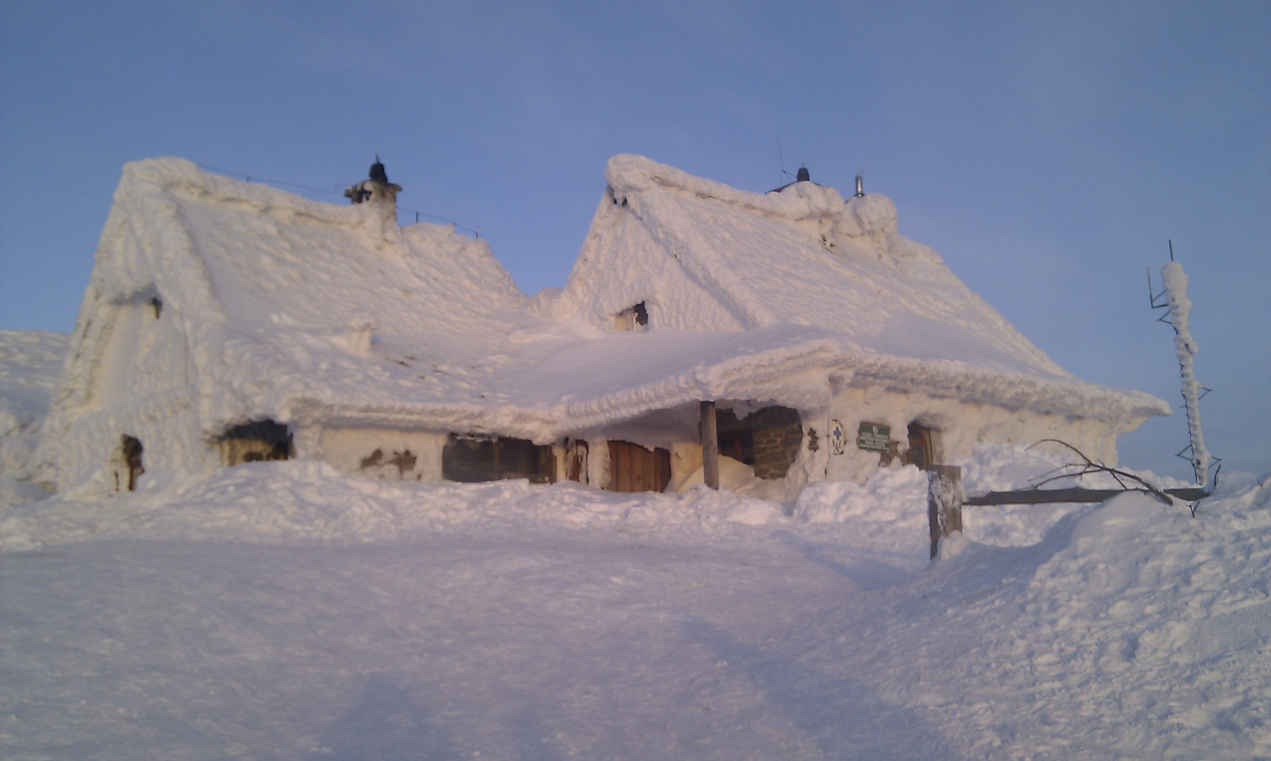 Chatka Puchatka na Połoninie Wetlińskiej w Bieszczadach